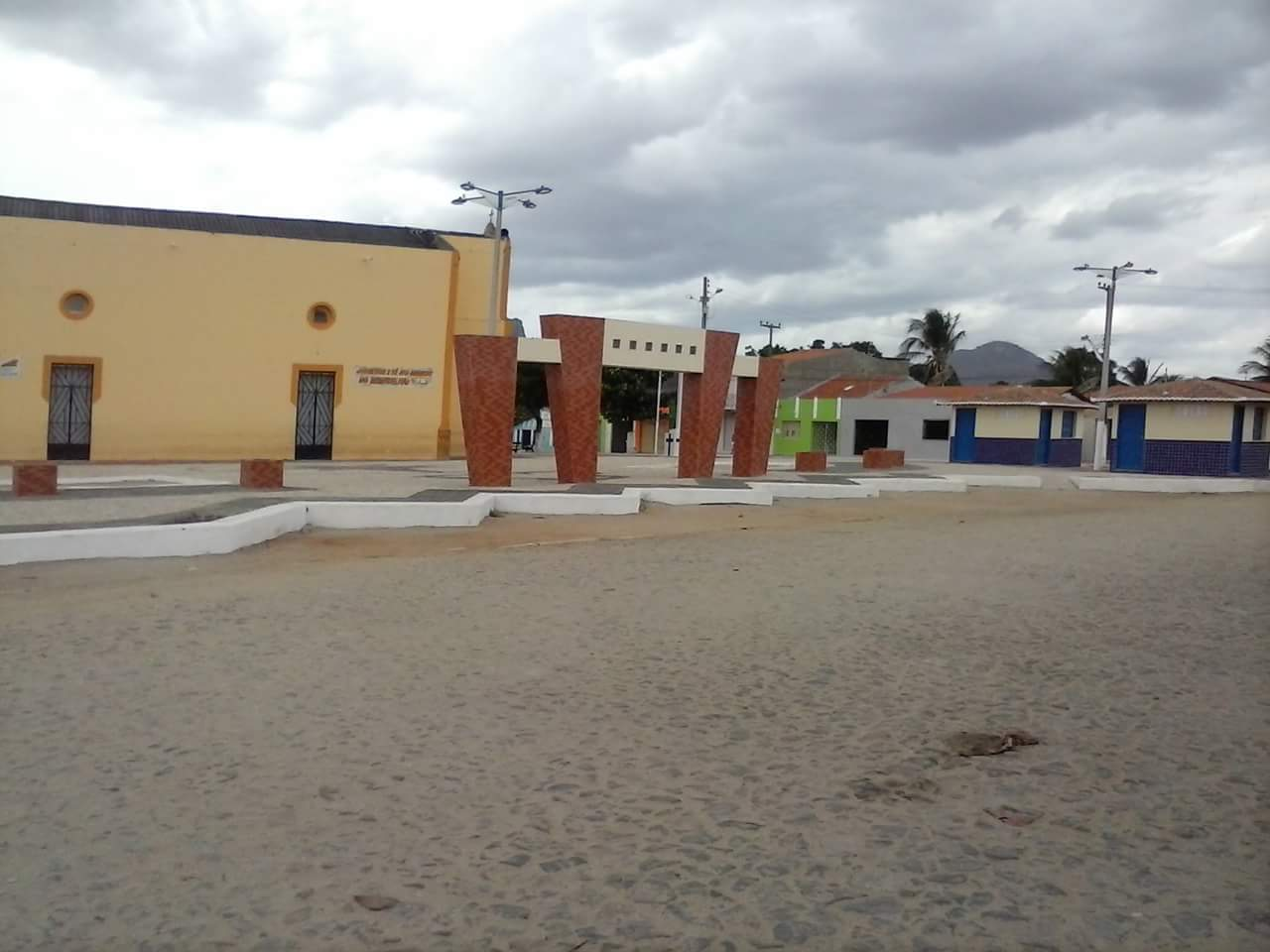 Essa praça foi reformada em 2014